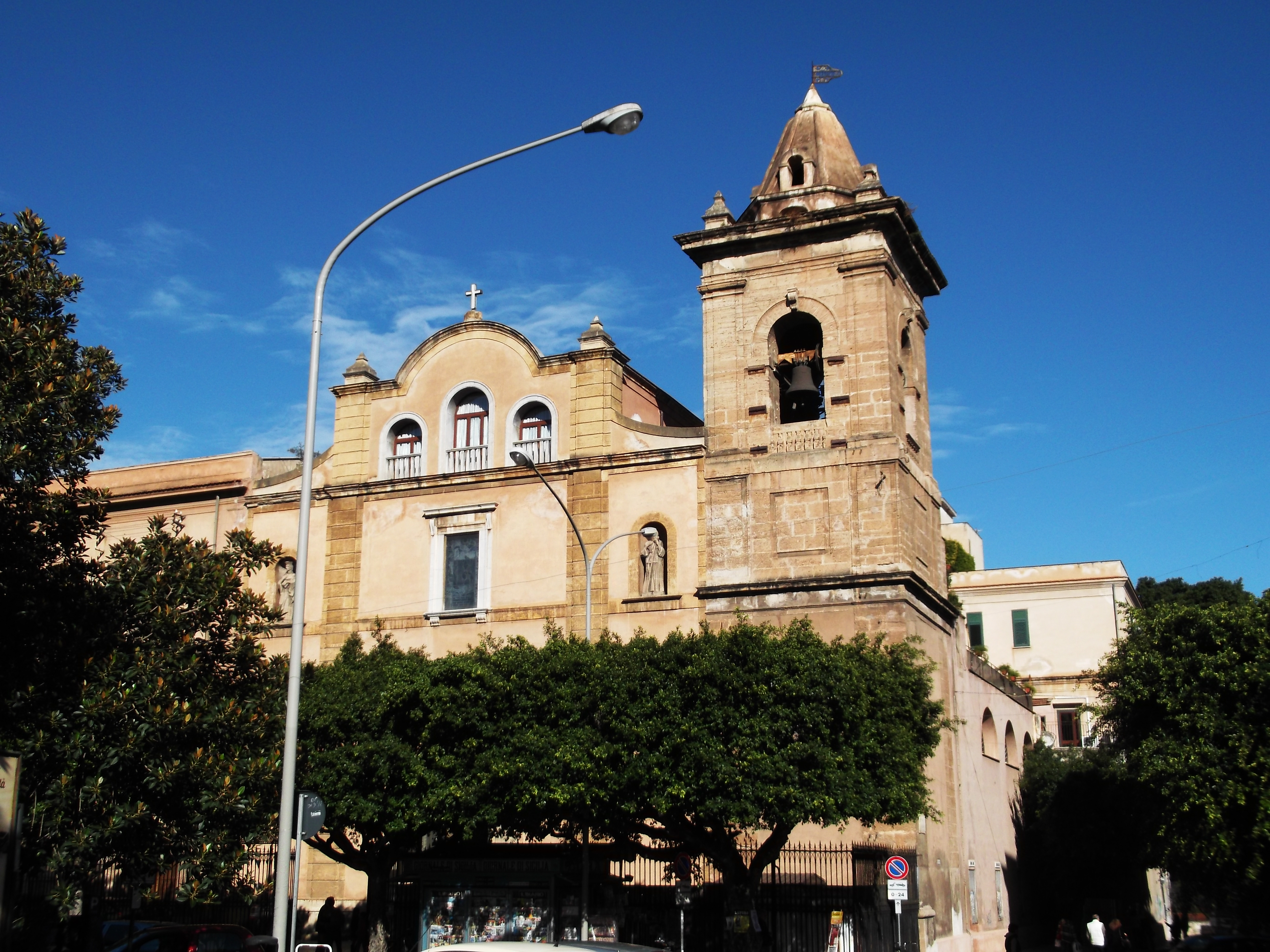 Facciata